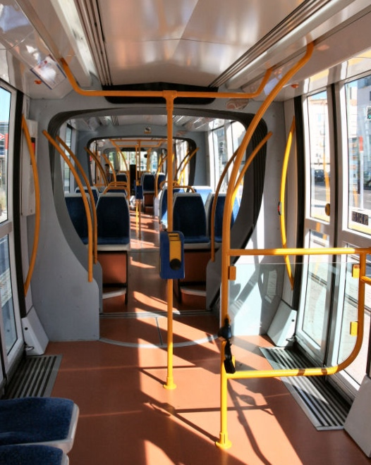 Interior del tranvía de piso bajo de la Línea ML1 (Madrid)